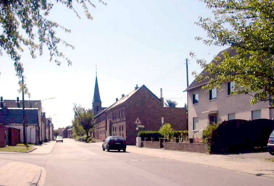 Rövenich Depicted place: Q2105340